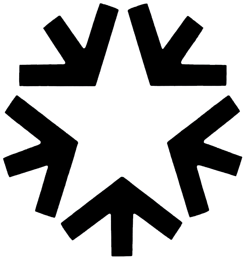 Emblema del Servicio Nacional de Turismo de Chile entre 1974 y 1990